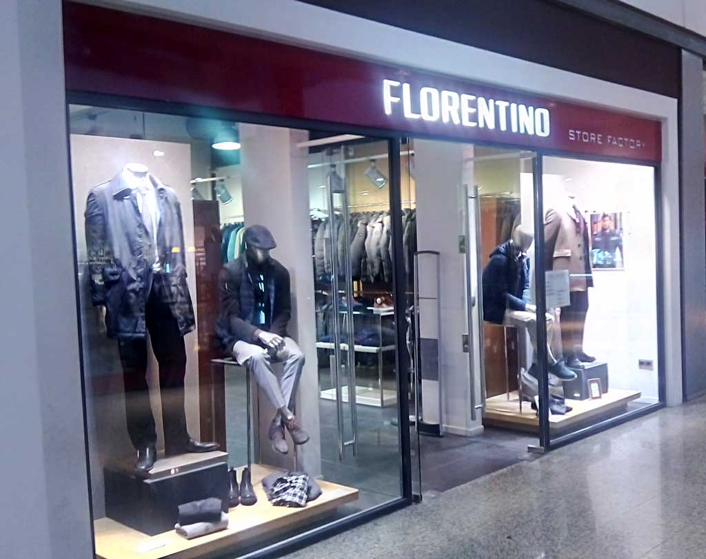 Tenda de Florentino en Narón.